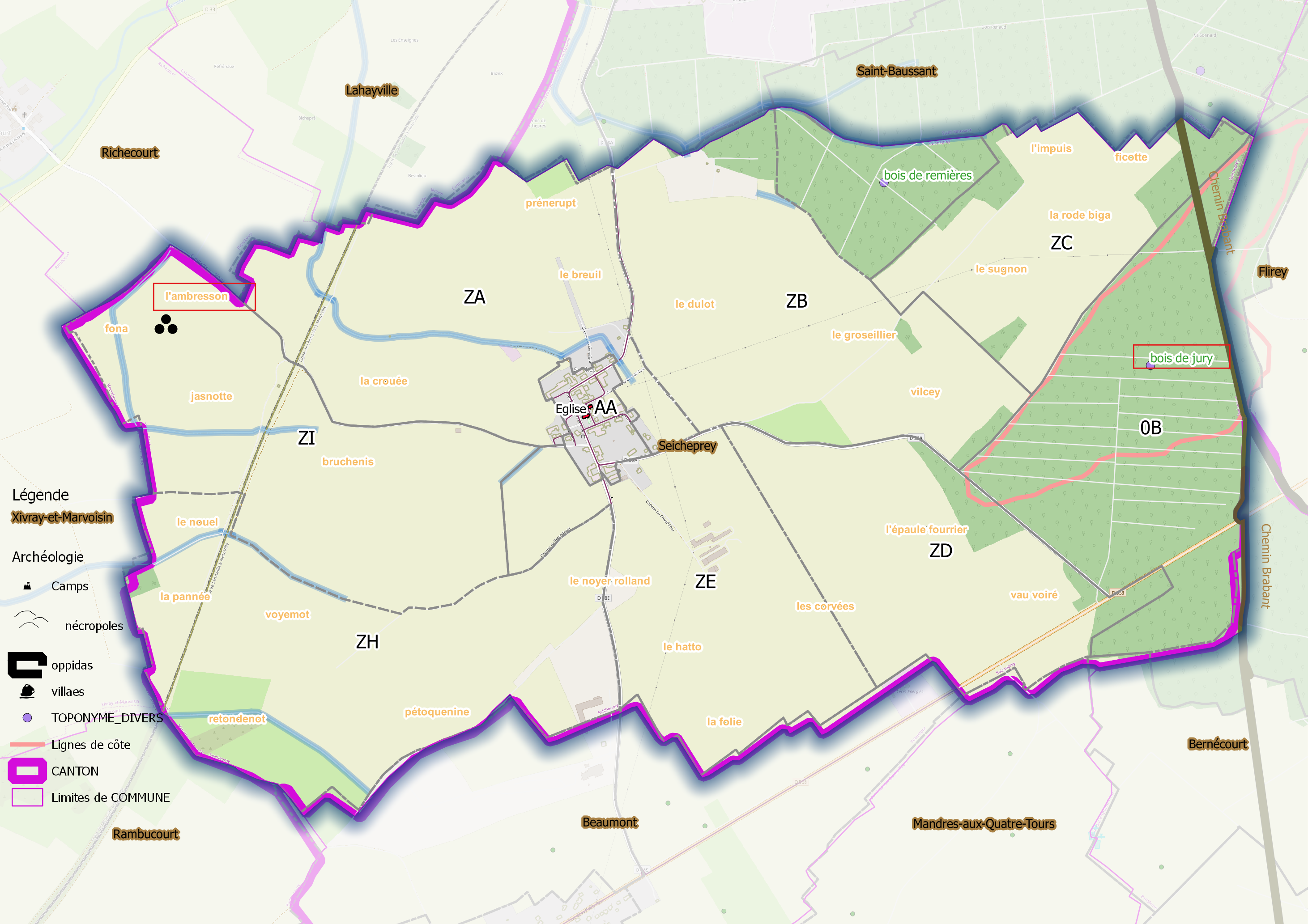 Seicheprey (ban communal) OSM et Qgis, mentions additionnelles